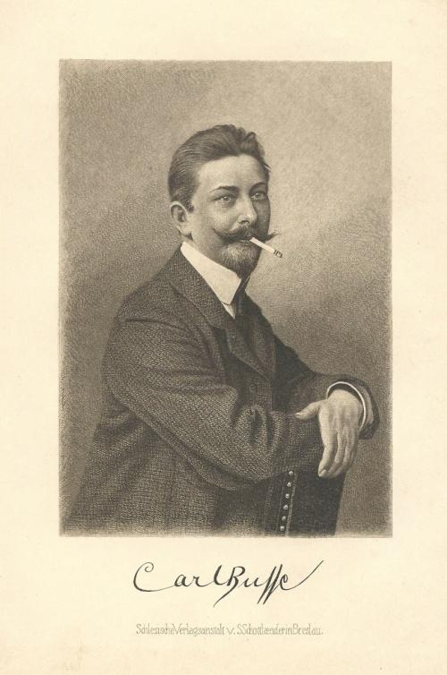 Porträt Carl Busse. Radierung von Johann Lindner mit faksimilierter Unterschrift des Porträtierten